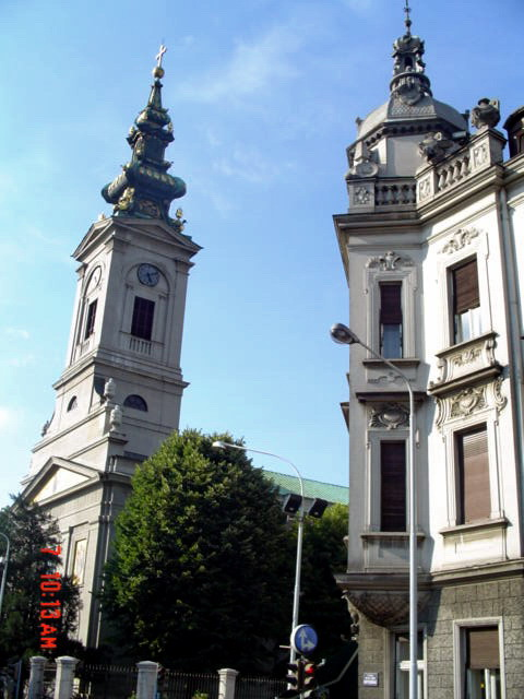 La cathédrale Saint-Michel de Belgrade a été construite de 1837 à 1840, à la demande du prince Miloš Obrenović